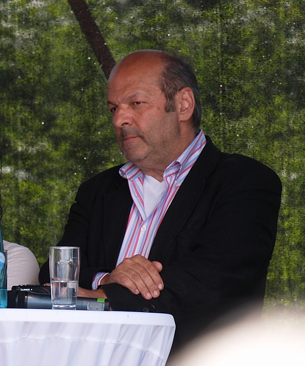 Bogomir Ecker, ein deutscher Bildhauer und Objektkünstler, bei der Eröffnungsveranstaltung der Emscherkunst.2010 in Herne